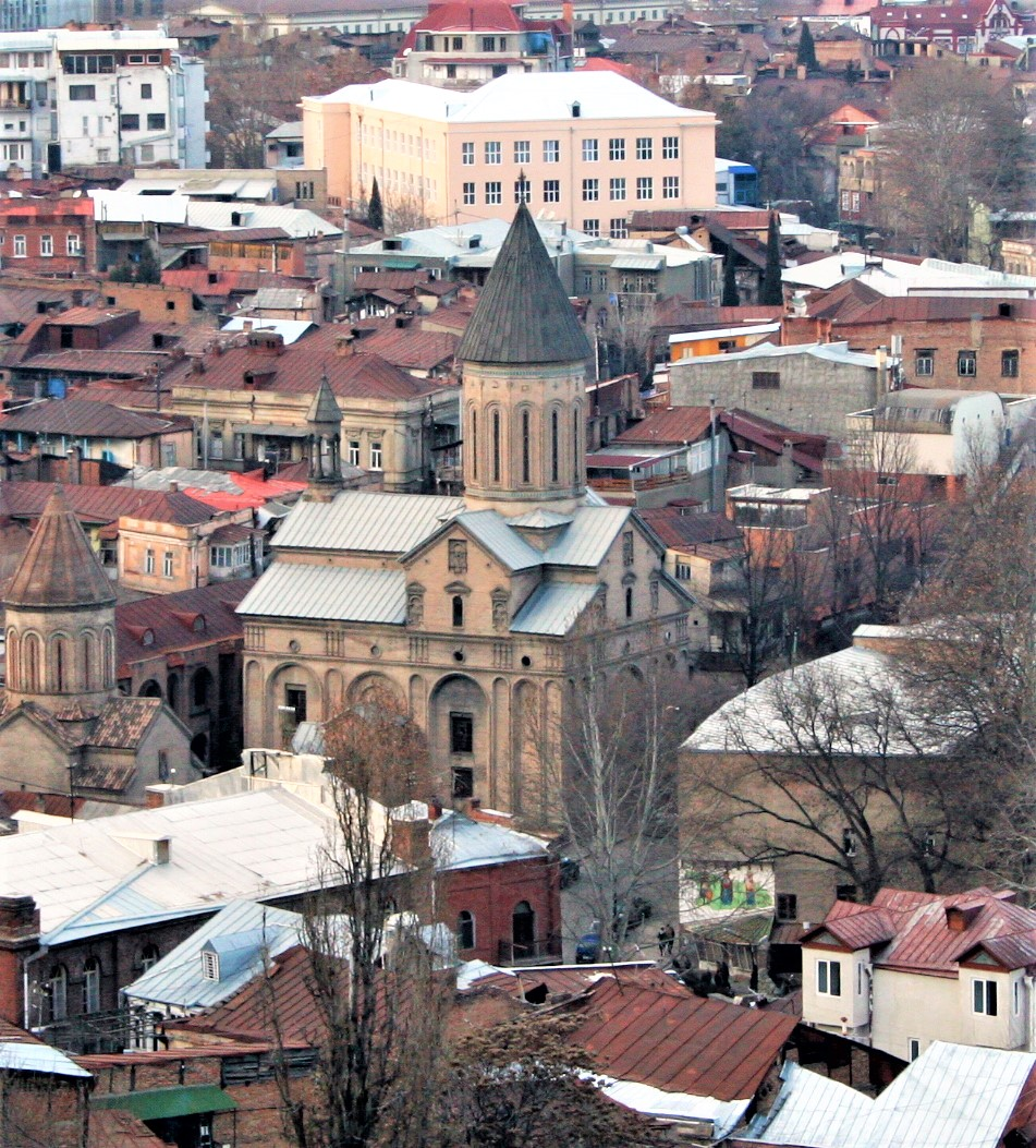 ნორაშენი. ფოტო: ალსანდრო.